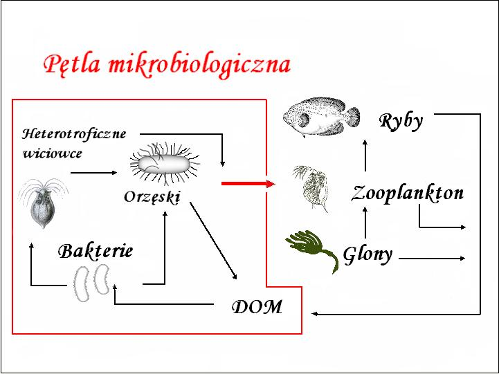 schemat pętli mikrobiologicznej